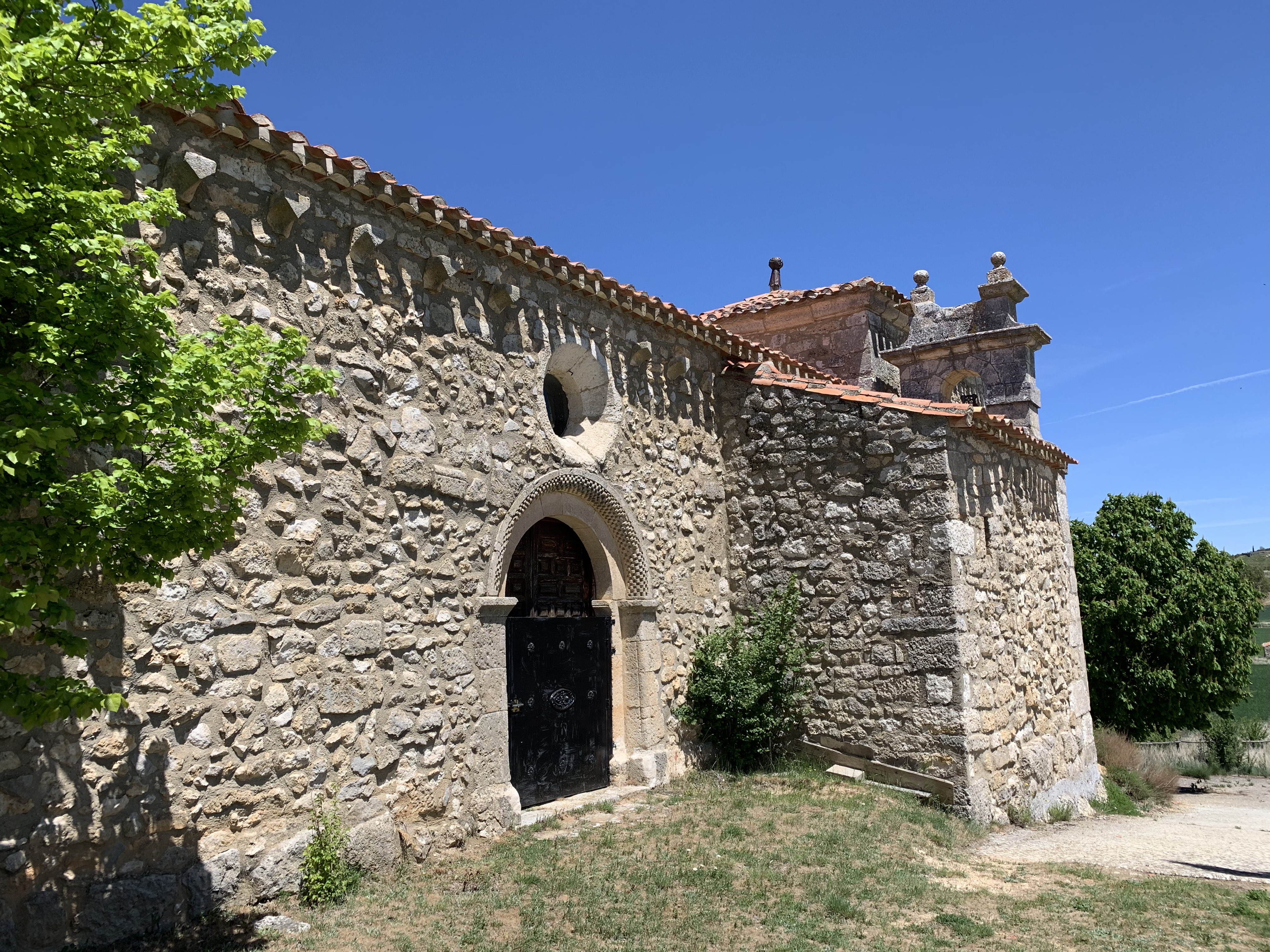 Santa María del Mercadillo